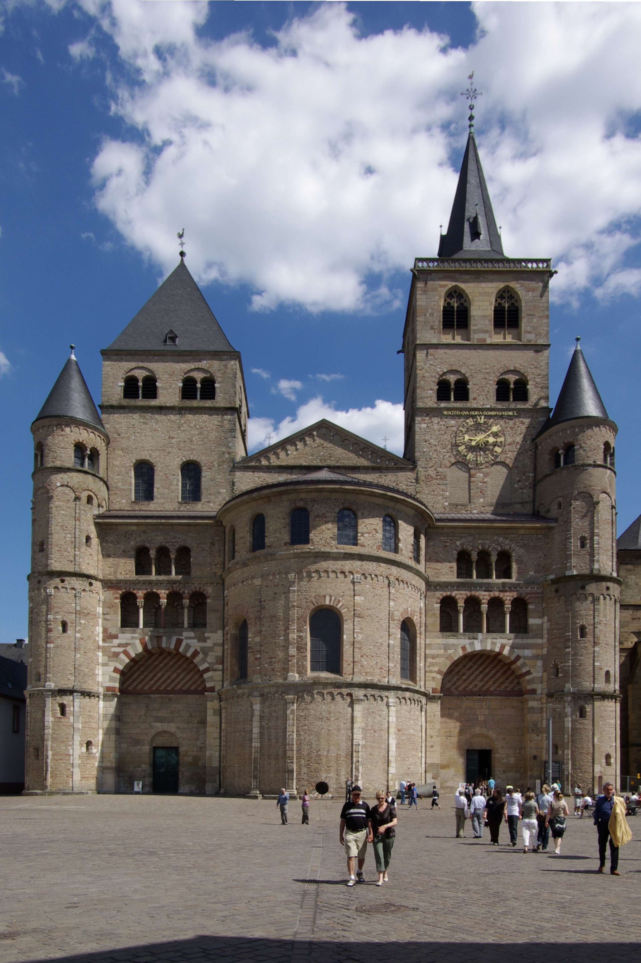 Trier, Dom